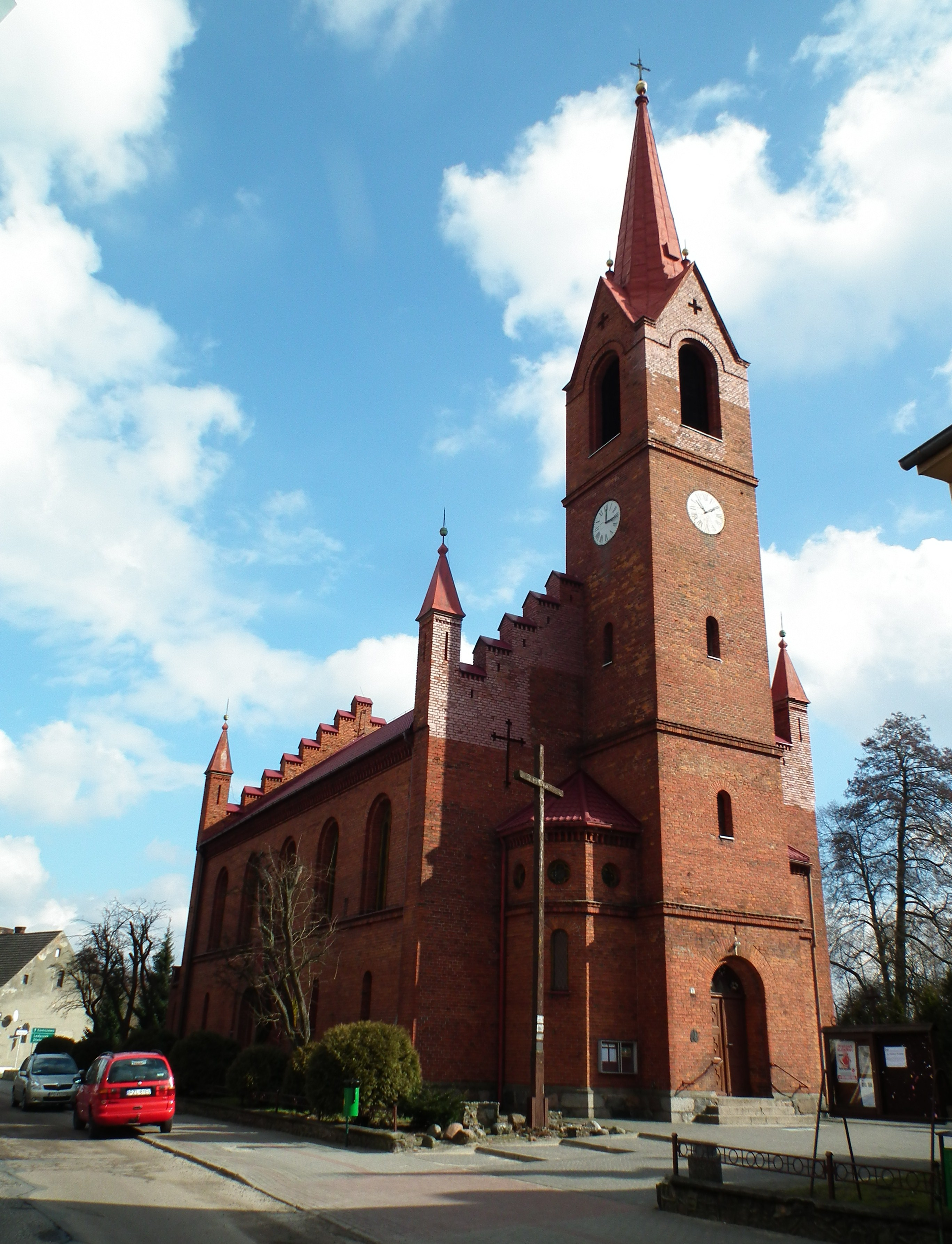 Kościół Matki BOskiej od Wykupu Niewolników w Okonku.